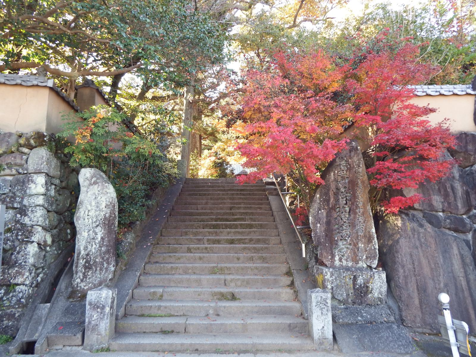 浄瑠璃寺の入口